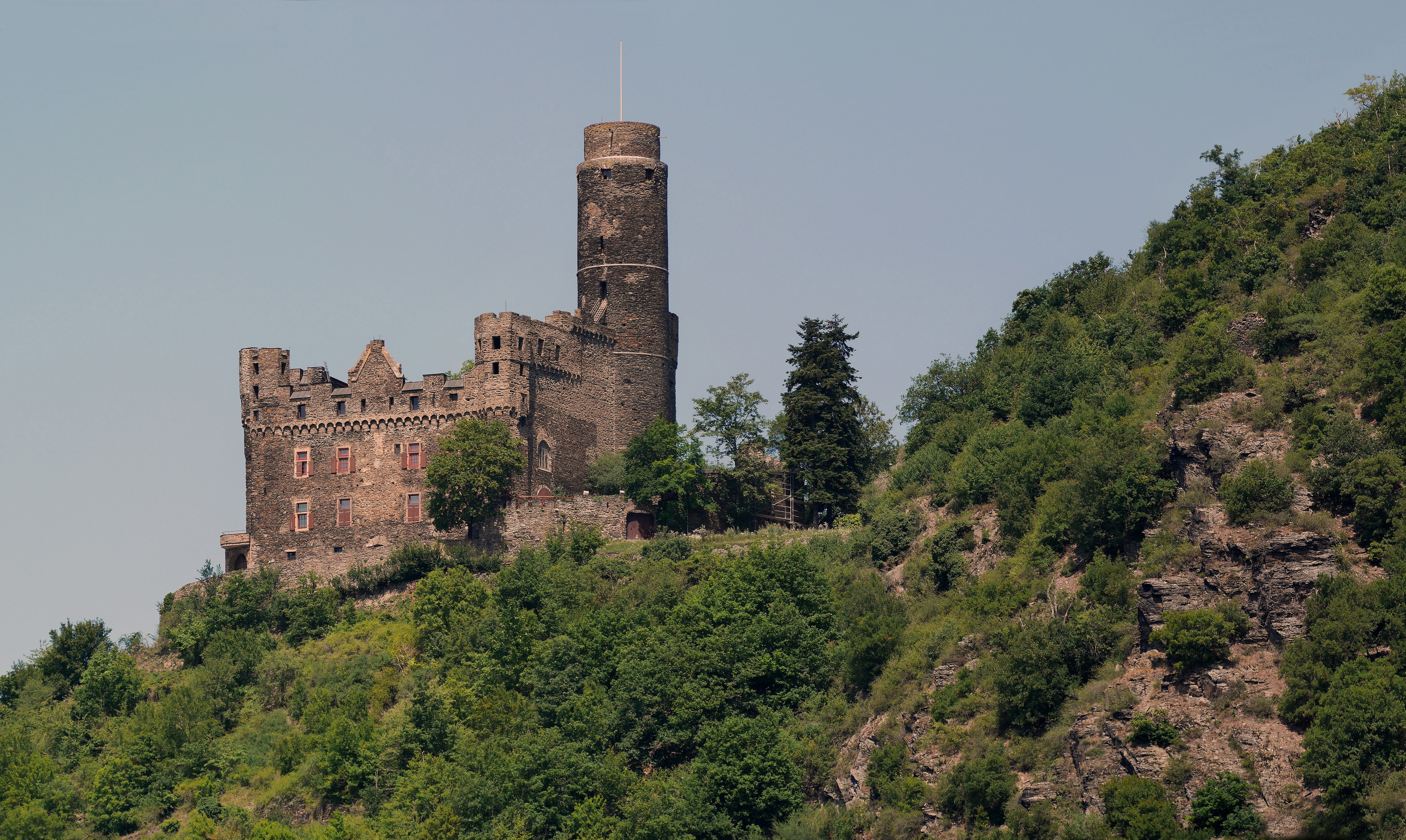 Die Maus am Mittelrhein wurde von 1353 bis 1357 erbaut. Sie wurde nie zerstört, verfiel erst während des 18. Jahrhunderts. 1806 wurde sie auf Abbruch verkauft. Die Burg wurde zwischen 1900 und 1906 wiederaufgebaut. This image was created with Hugin.